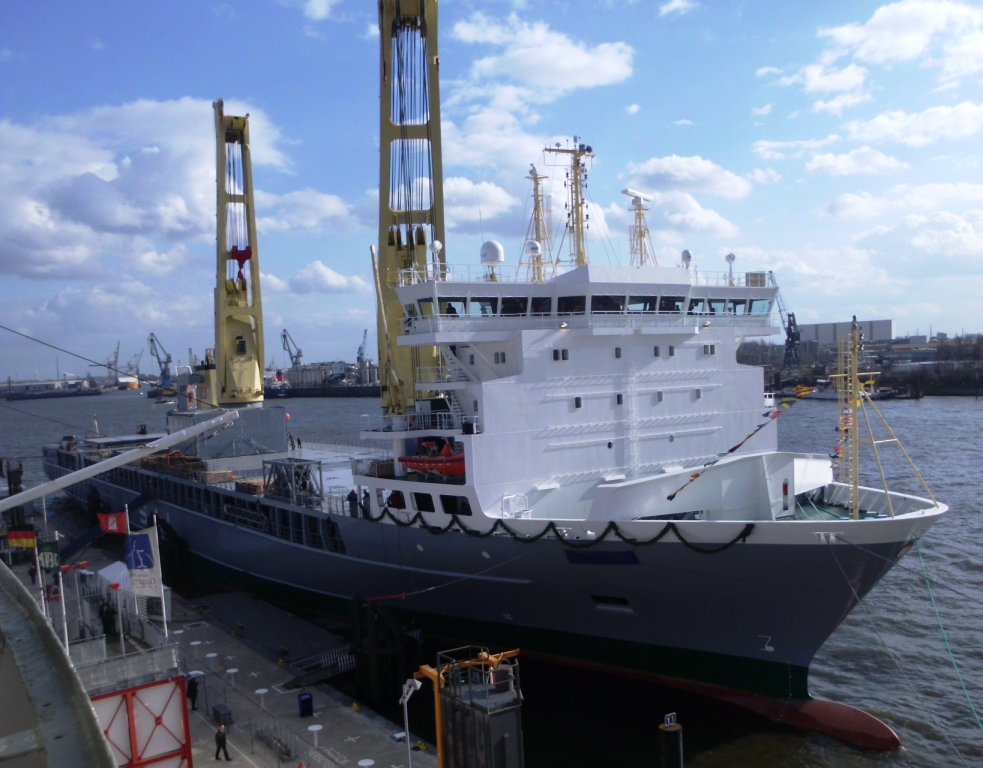 Taufvorbereitungen für den 2. SAL-Neubau Type 183 von der Sietas Werft